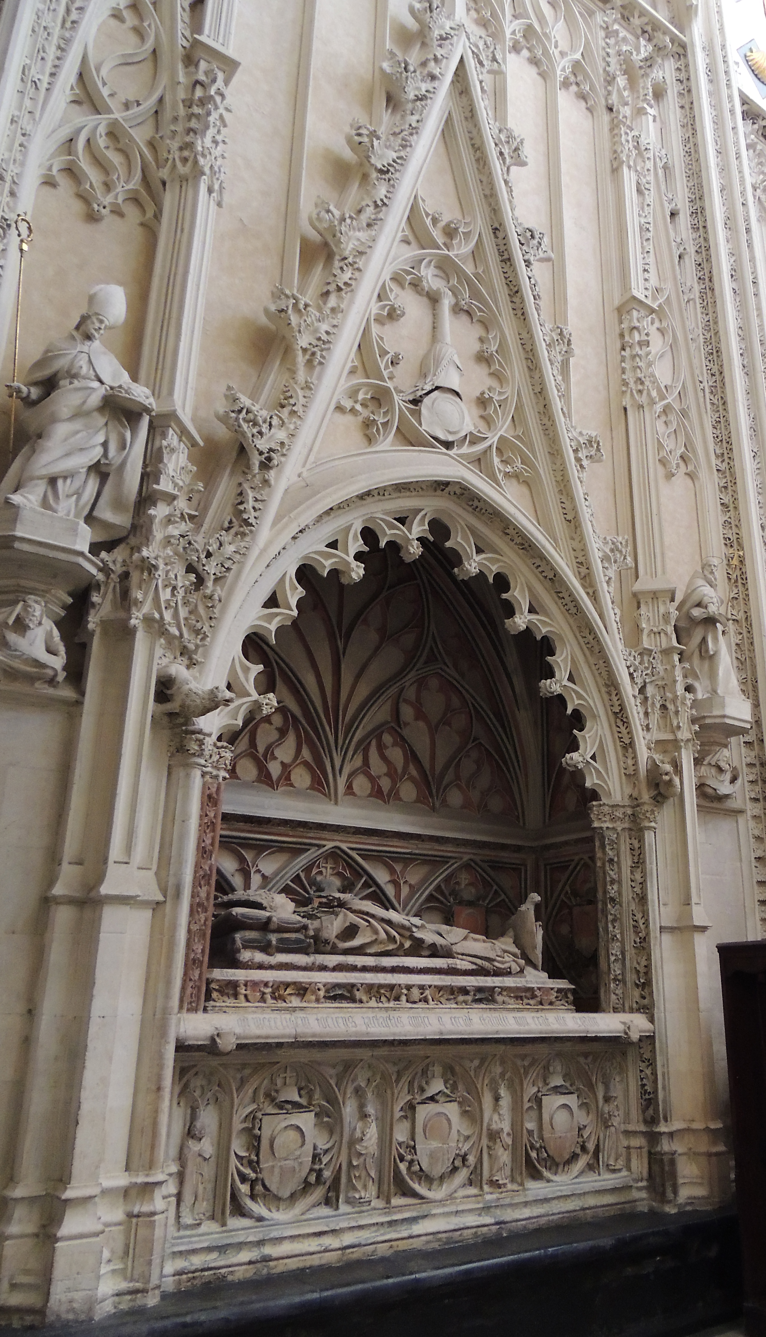 Sepulcro del prelado español Juan de Cerezuela († 1442), que fue arzobispo de Toledo y de Sevilla y obispo de Osma, en la capilla de Santiago de la catedral de Toledo, (España).